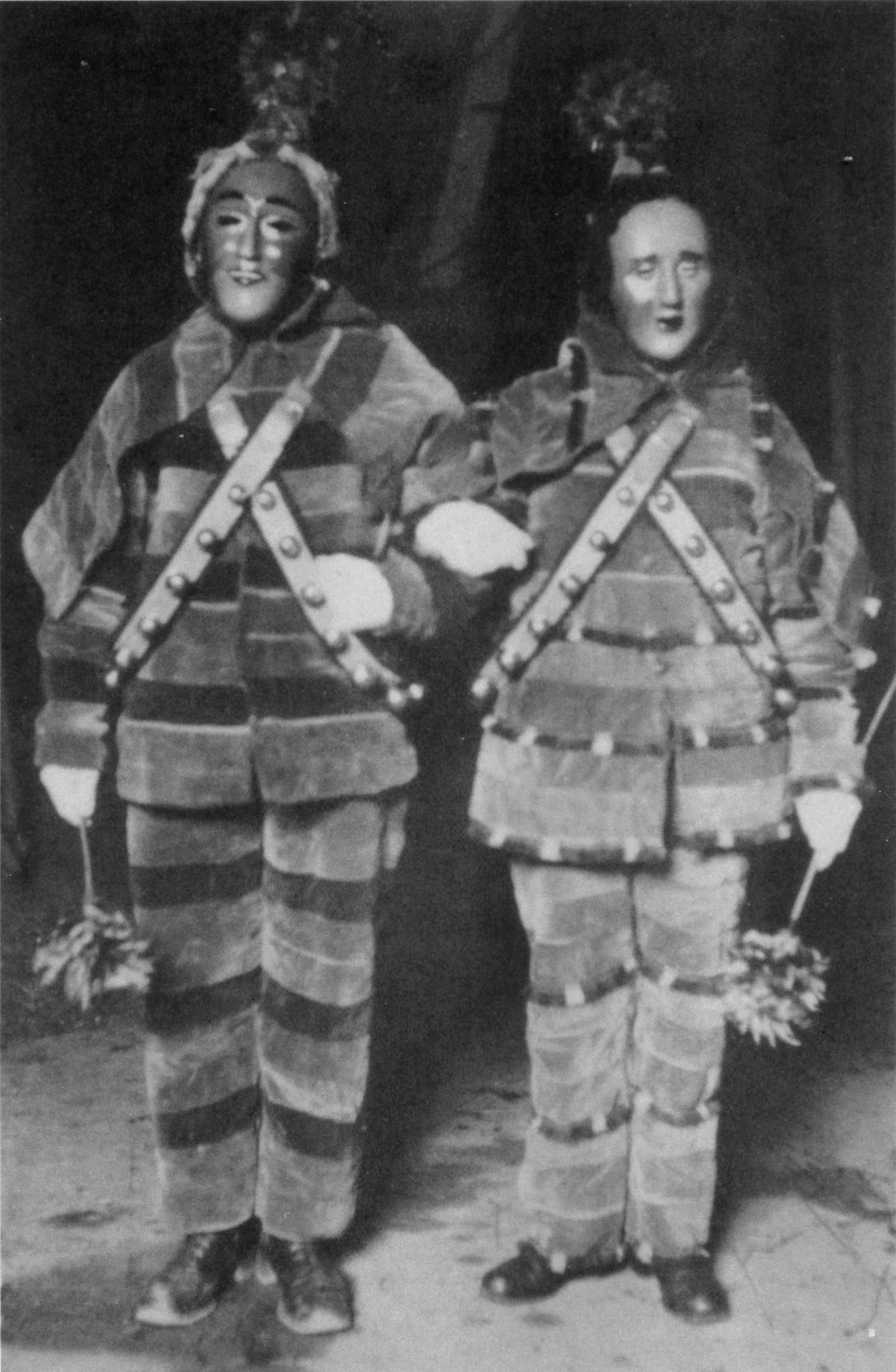 Frittlingen, das älteste Foto von der Frittlinger Fasnet: zwei alte Narrenkleider aus Samt